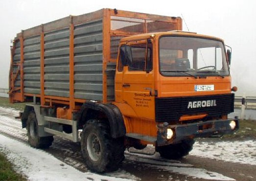 Landwirtschaftlicher Lkw von Rhein-Bayern (Agrobil)